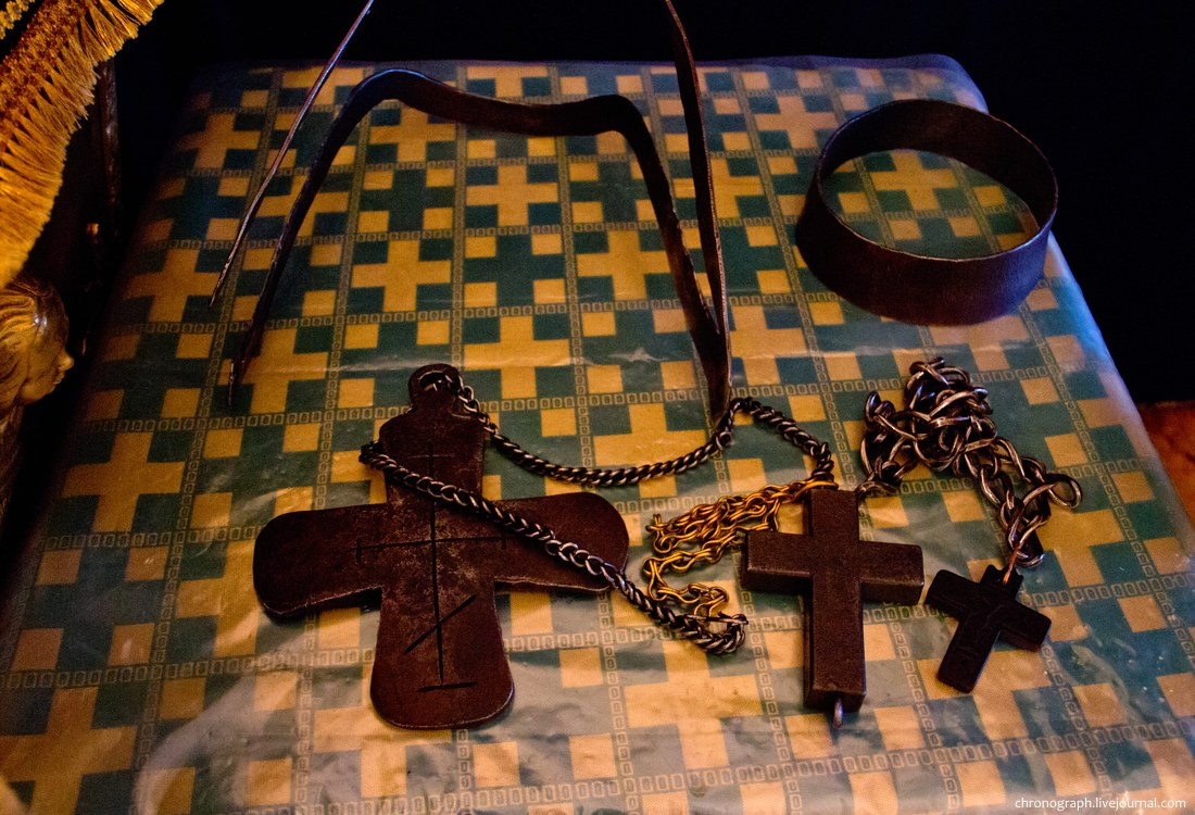 Вещи схимонаха Пантилеймона